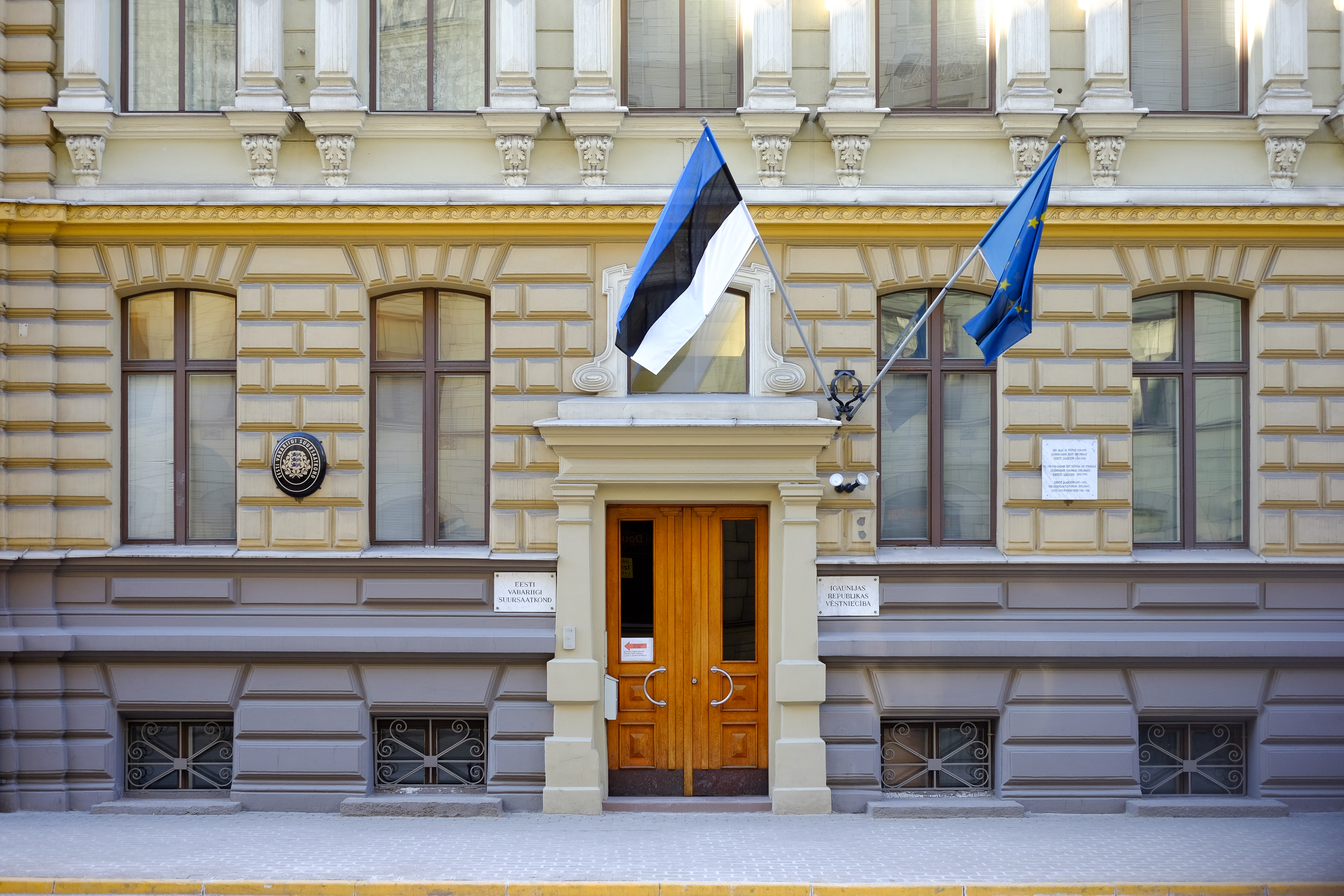 Īres nams, Rīga, Skolas iela 13